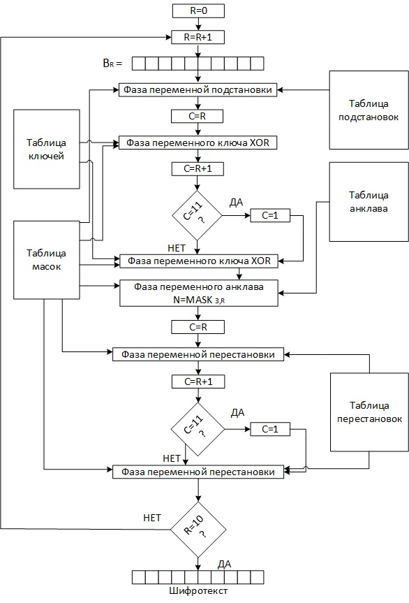 Схема описывает все таблицы и их взаимодействие с байтами данных для получения шифротекста согласно алгоритму REDOC